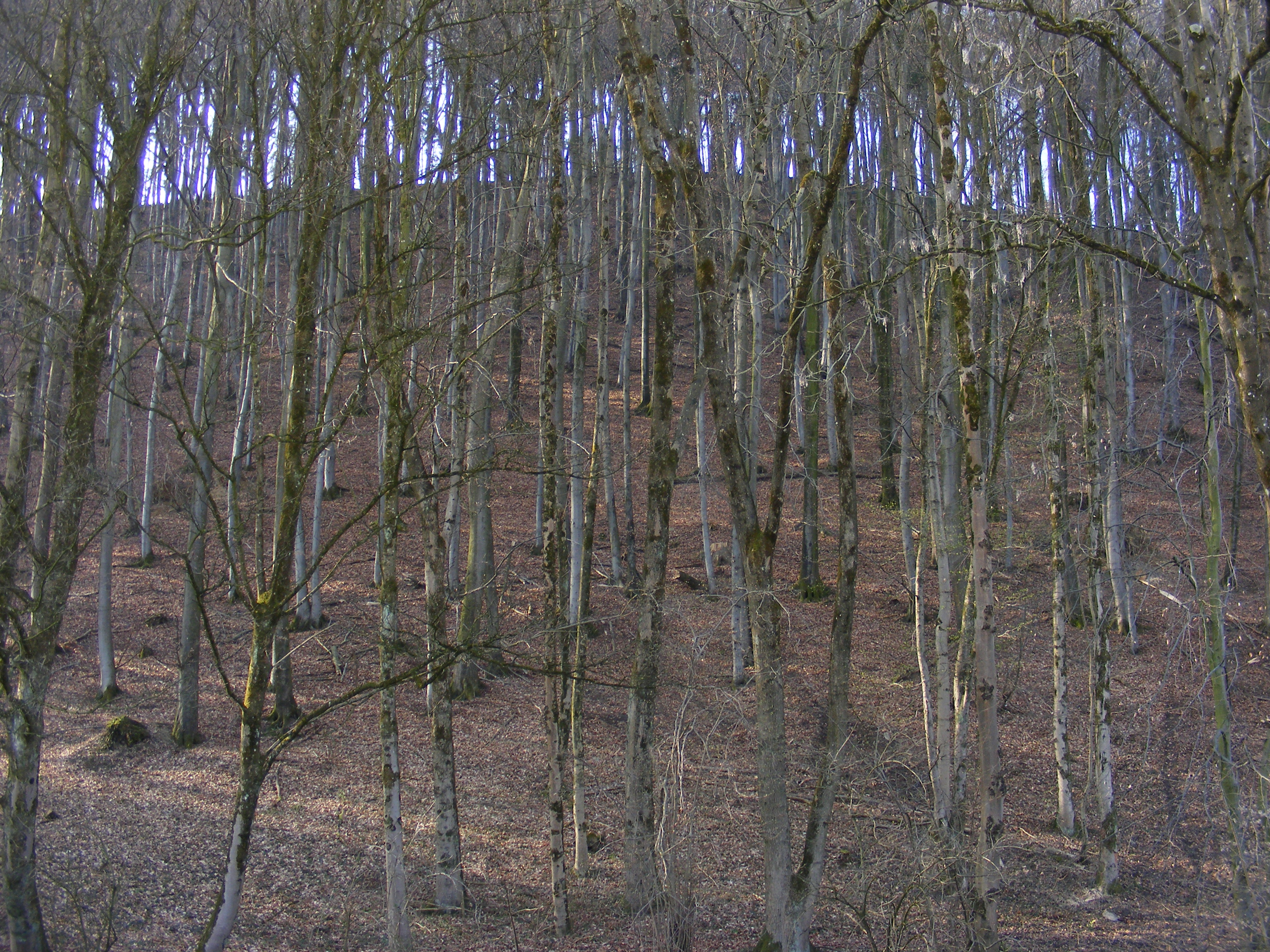 Baumbestand auf der Nordseite des Plainbergs, Gemeinde Bergheim, Land Salzburg.